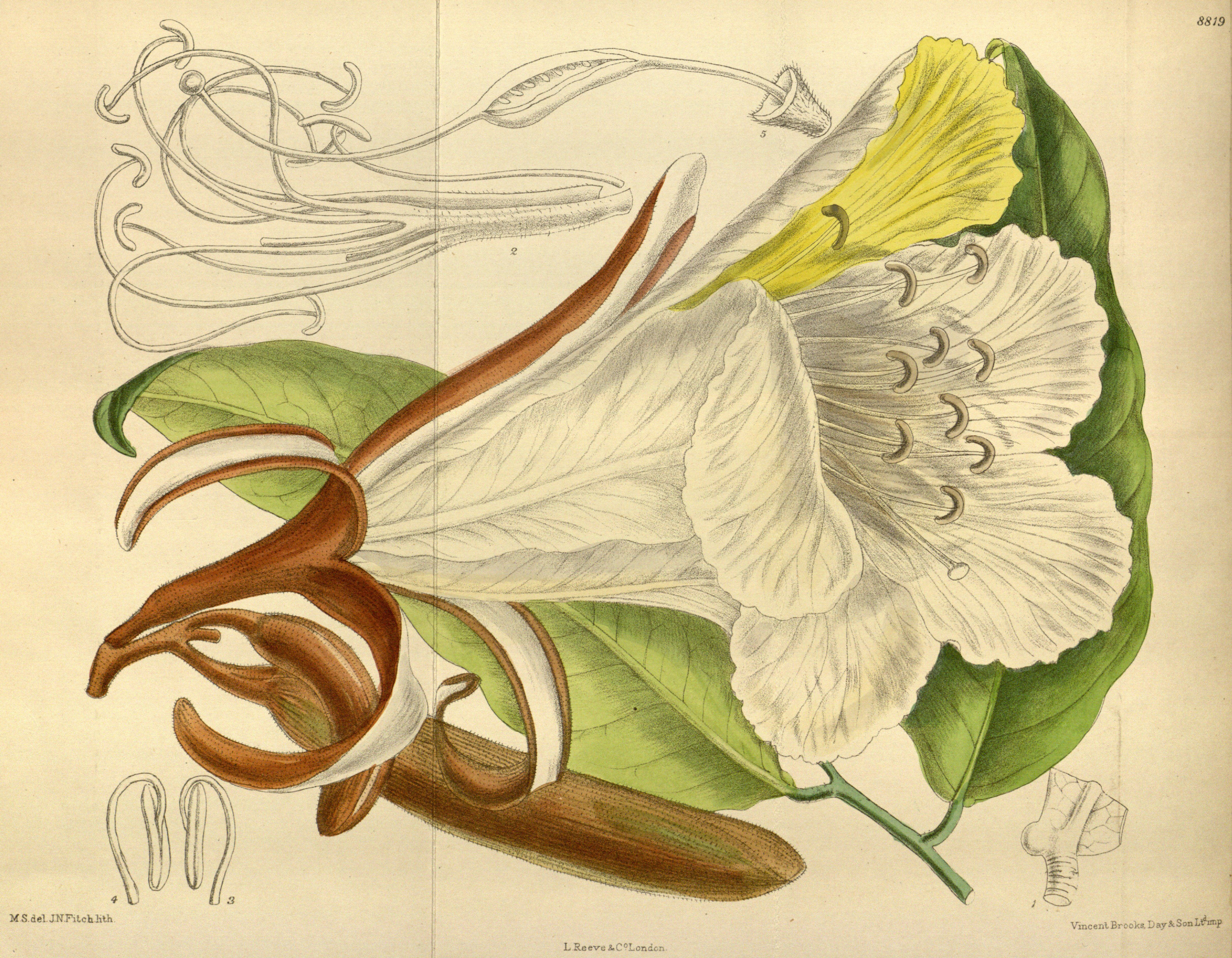 Baikiaea insignis, Fabaceae, Caesalpinioideae